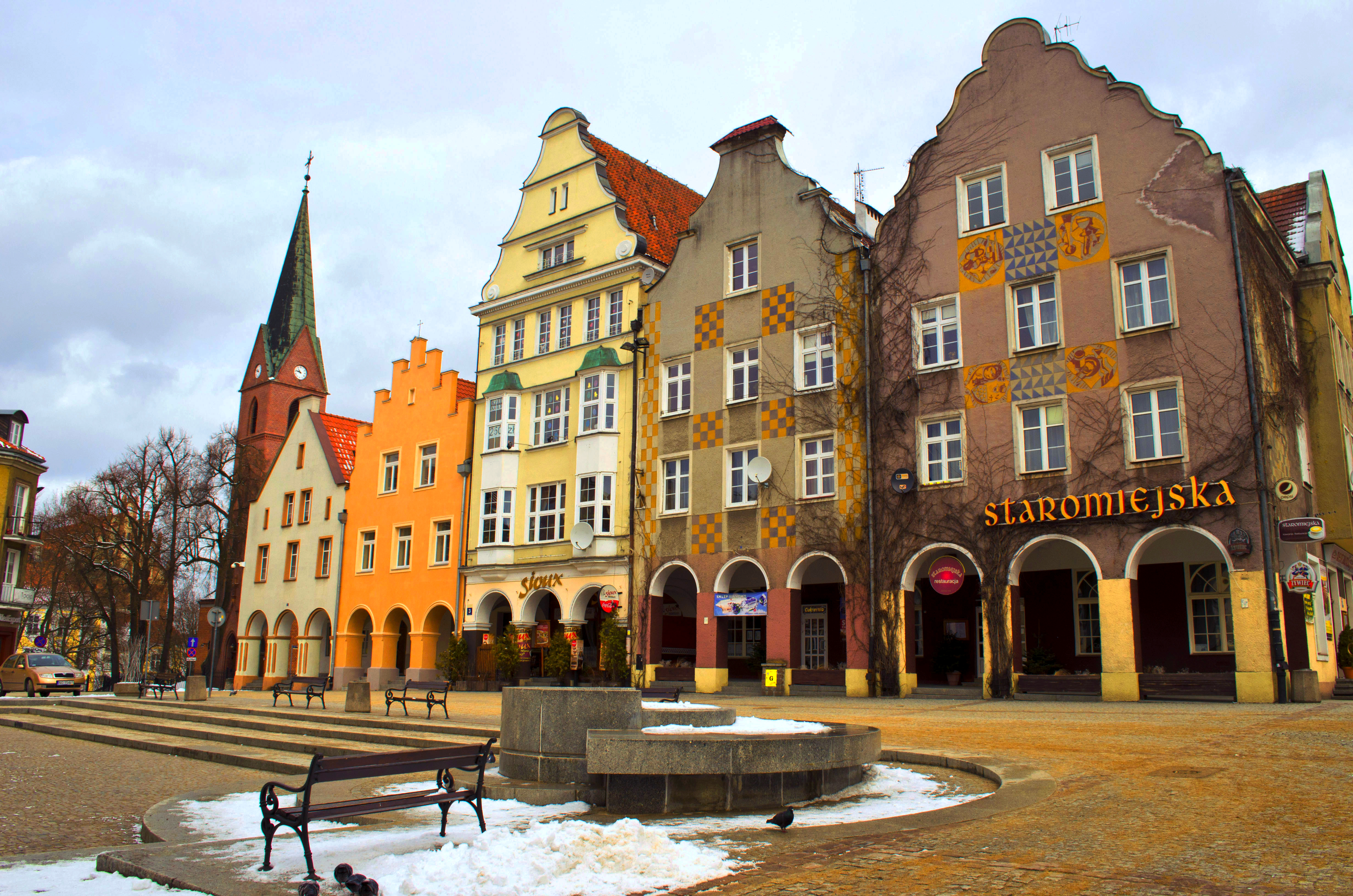 Olsztyn